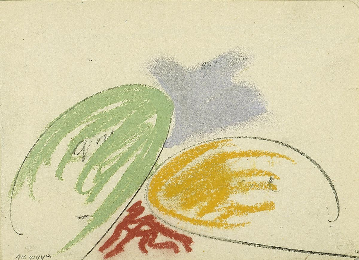 Onderdeel van schetsboek 19 met op de voorzijde het opschrift ‘1915 / Utrecht’.